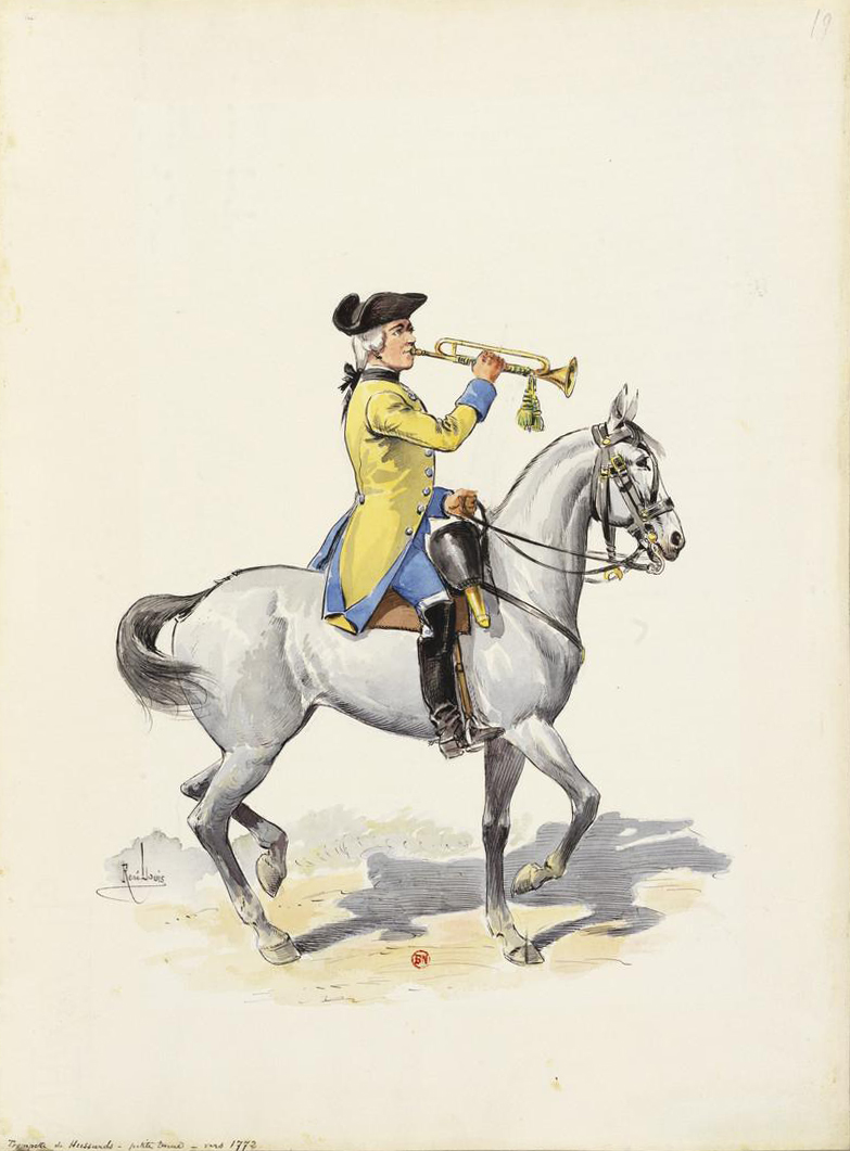 Trompette des Hussards de Chamborant en petite tenue en 1772